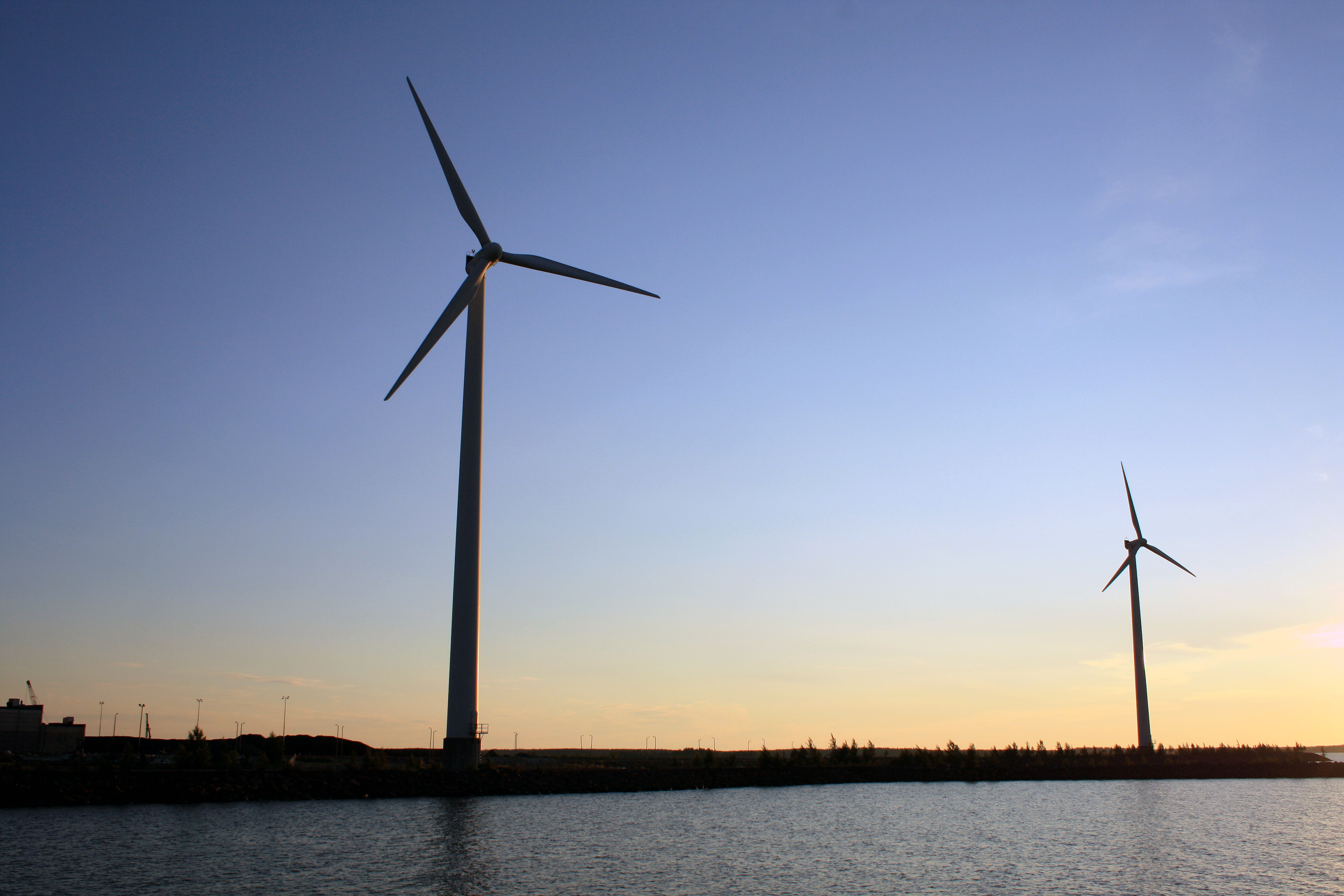 Kokkolan tuulipuiston kaksi tuuliturbiinia.